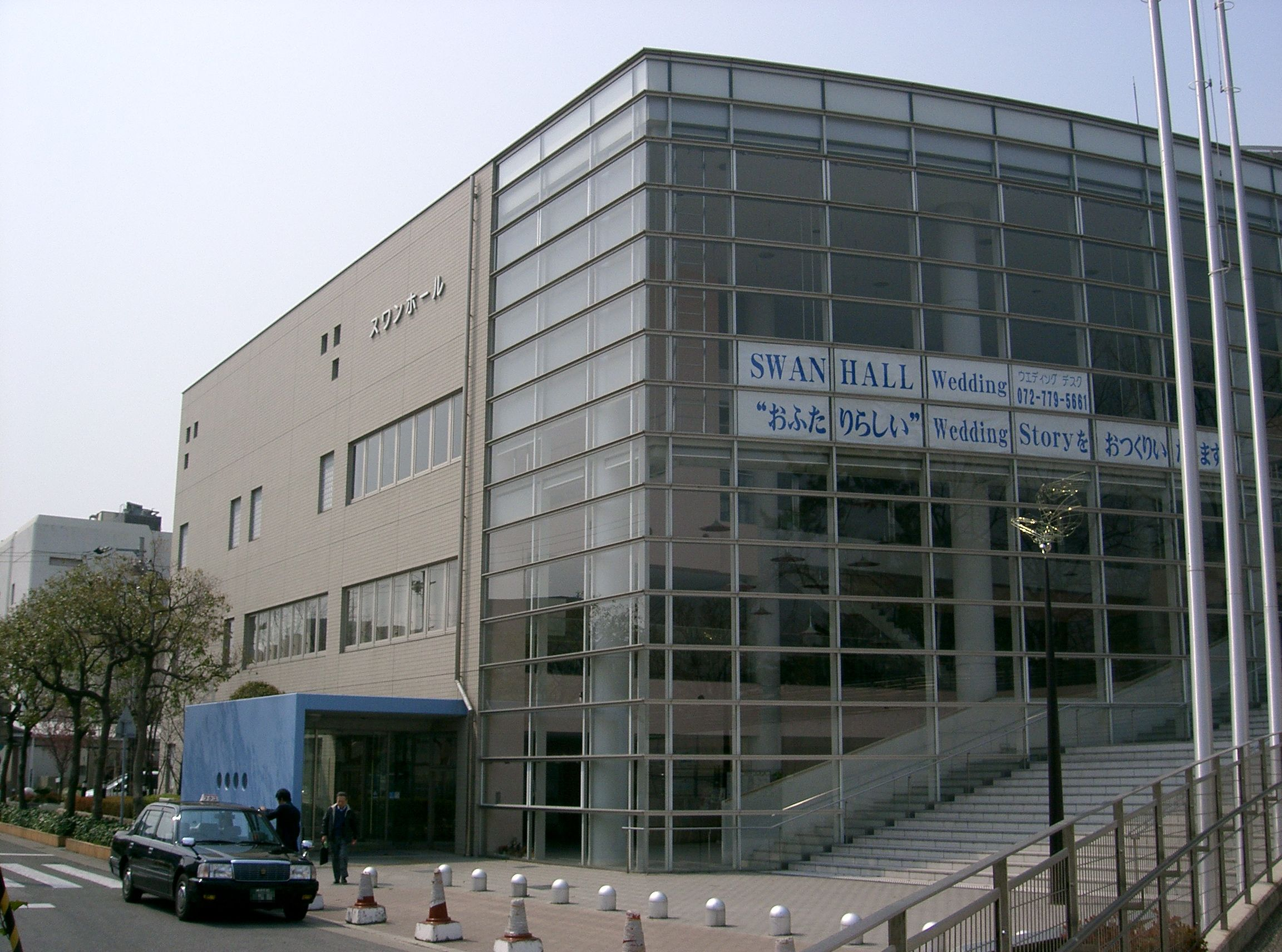 Swan hall